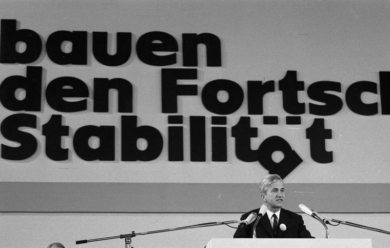 CDU-Parteitag 1972 in der Wiesbadener Rhein-Main-Halle (Richard Karl Freiherr von Weizsäcker) 9.-11.10.1972